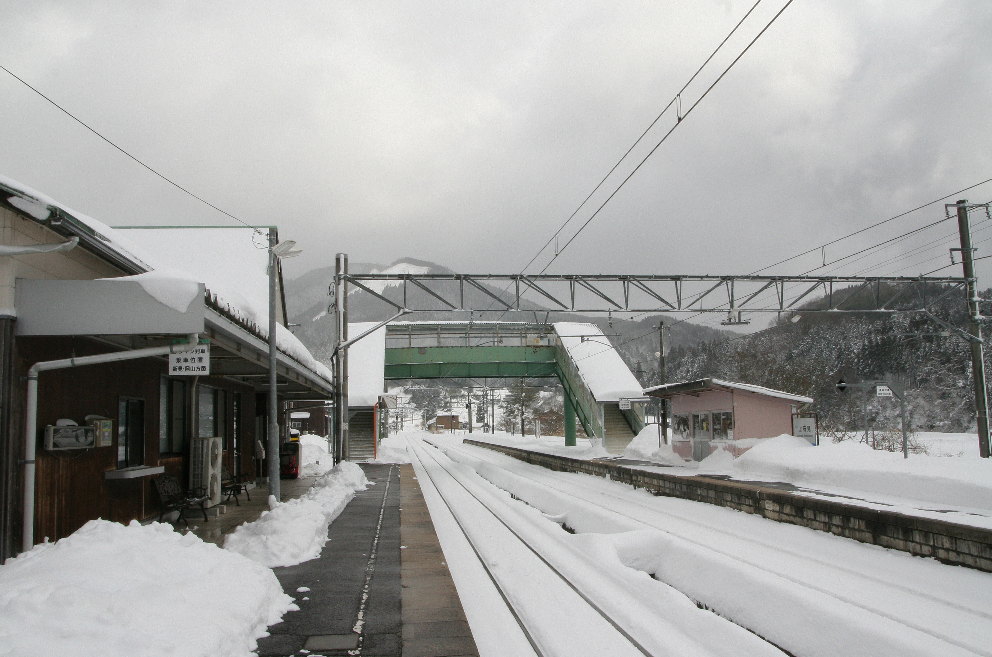 上石見駅の構内